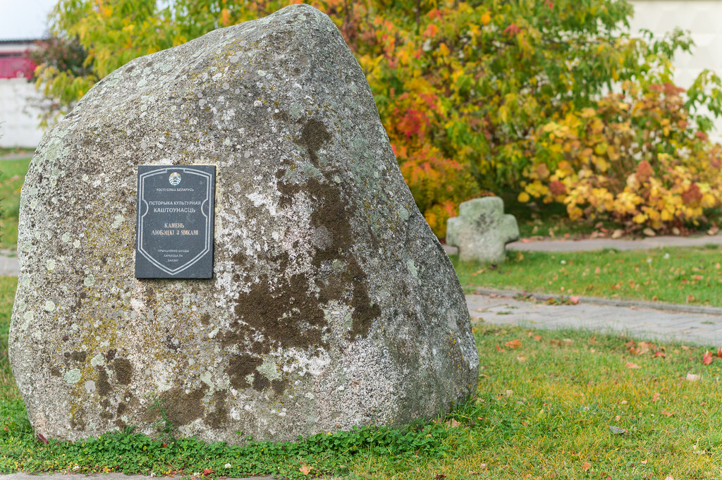 Валун «Любецкі» з ямкамі. Перавезены з в. Любкі ў Вілейку